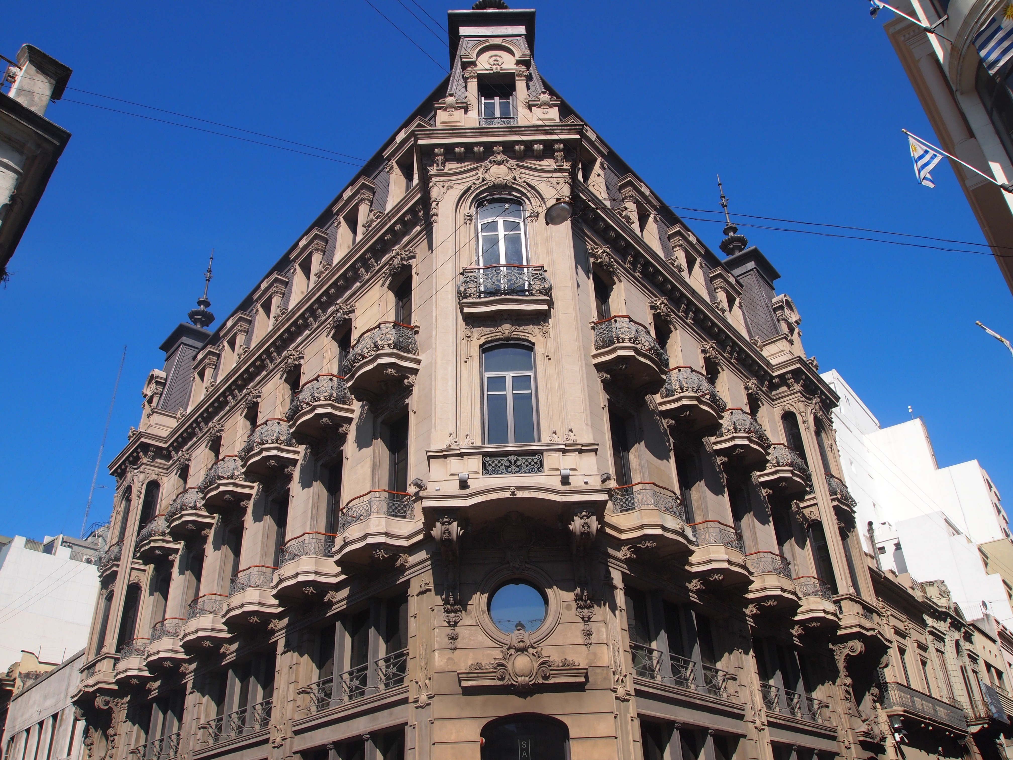 Gran Hotel Colón - Palacio Gandós. Ubicada en el departamento de Montevideo